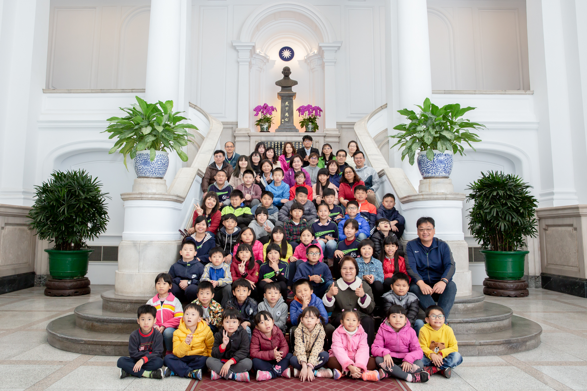 總統於官邸接待興華國小師生